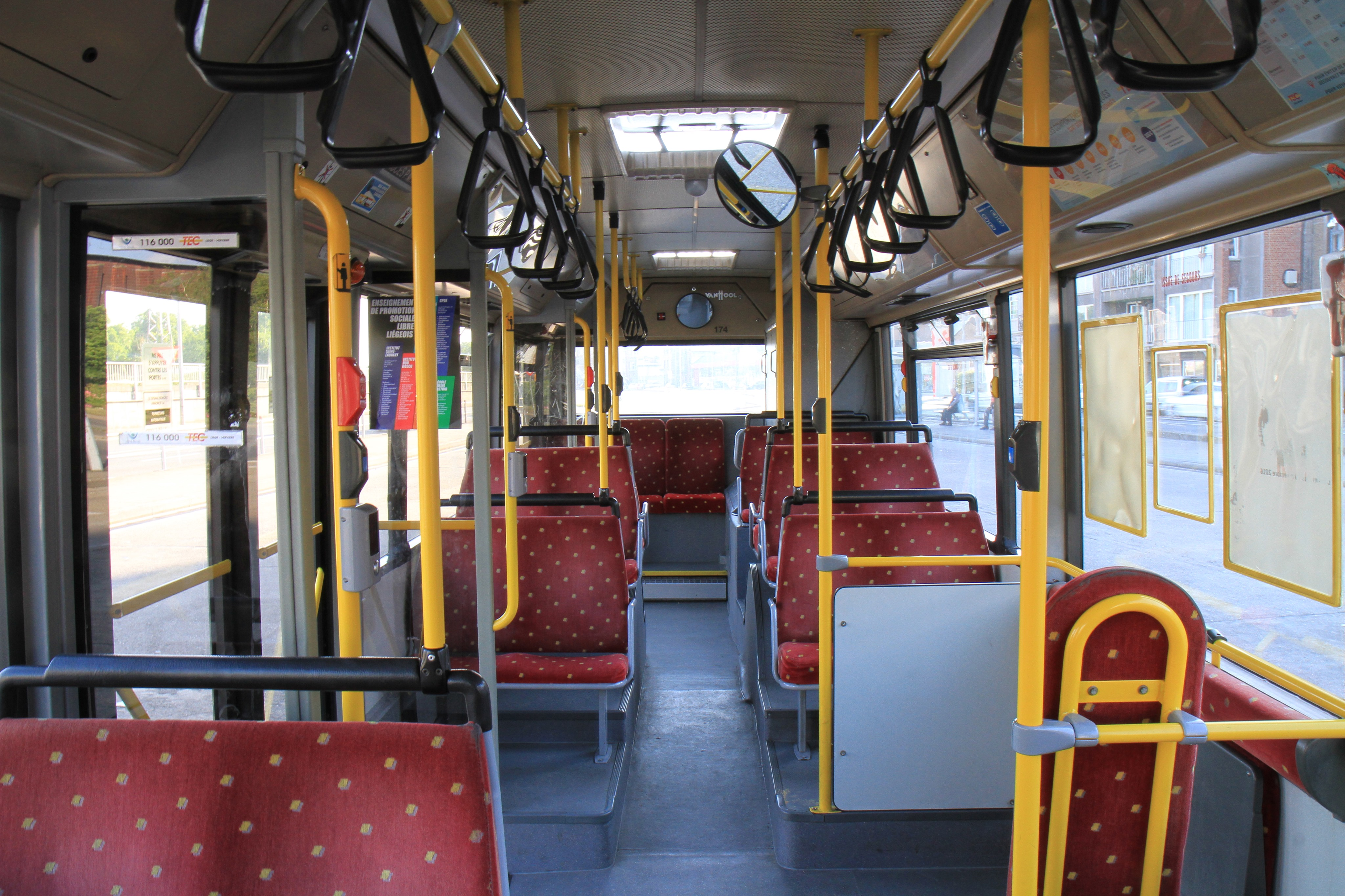 Intérieur d'un autobus Van Hool A330 du TEC Liège Verviers n°5174 - série 5146-5212.